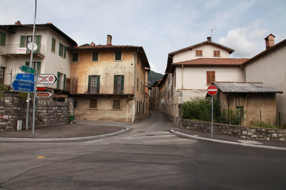 Rancate 08/2010